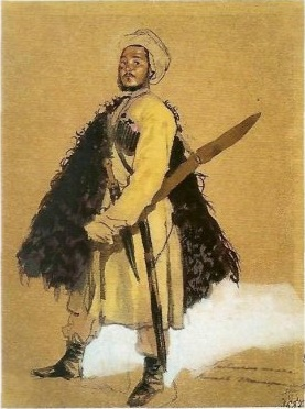 Казак Гребенского полка Татаринцев 1841г. Акварель. Государственный Русский музей. Санкт-Петербург